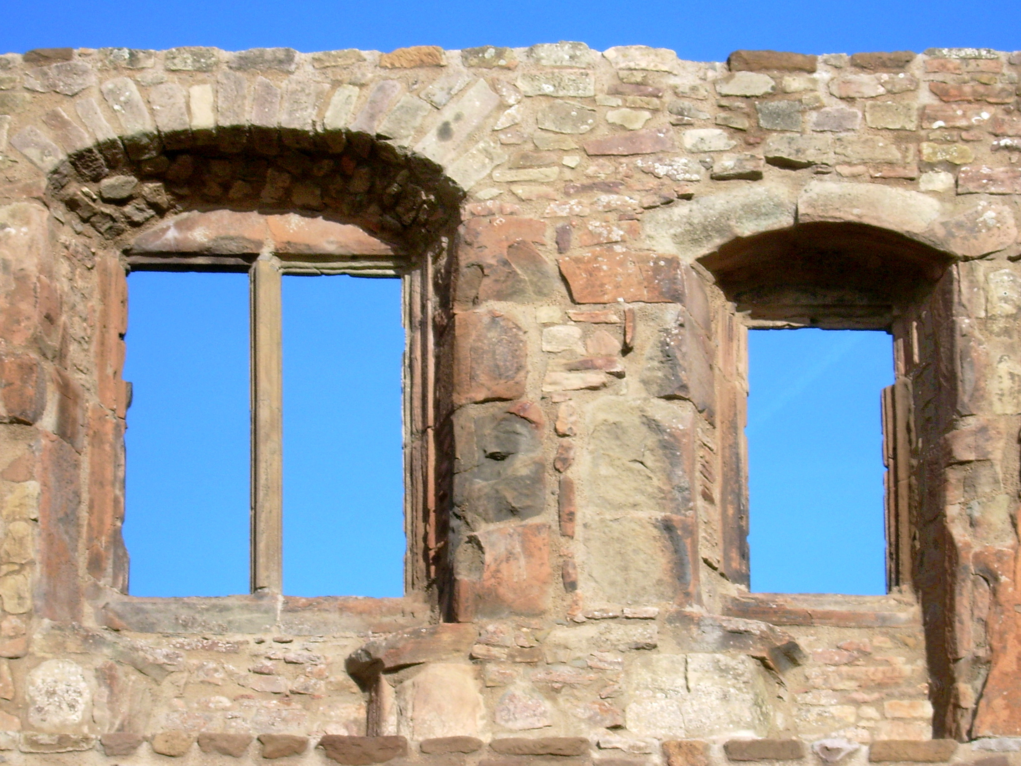 Fenster der Burg Lichtenberg